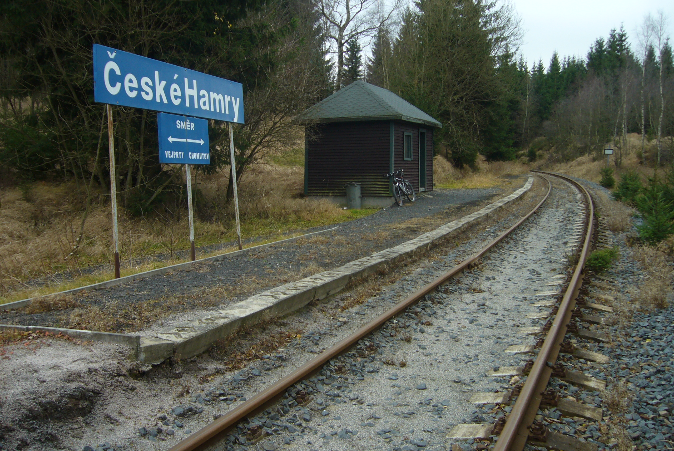 České Hamry - železniční zastávka